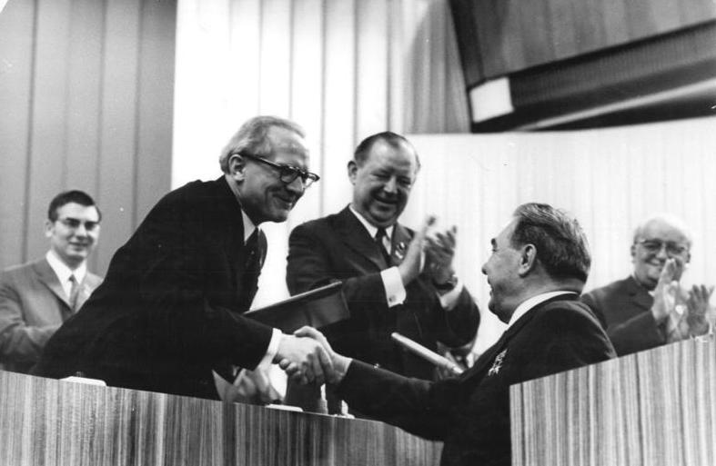 ADN-ZB Kollektiv 16.6.71-pe-Berlin: VIII. Parteitag-Ansprache Breshnews-Unter dem Beifall der Teilnehmer des Parteitages überreichte Leonid Breshnew (vorn r.), Generalsekretär des ZK der KPdSU, nach seiner Ansprache am 16.6.71 das Grußschreiben seiner Partei an den VIII. Parteitag der SED an Erich Honecker (vorn l.), Erster Sekretär des ZK der SED. Unser Foto zeigt ferner die Mitglieder und Kandidaten des Politbüros Werner Lamberz, Gerhard Grüneberg und Friedrich Ebert (v.l.n.r.). (VIII C) Reporter: Koard (siehe ADN-Meldung)